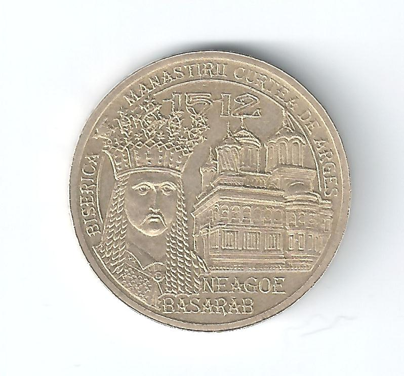 spate moneda